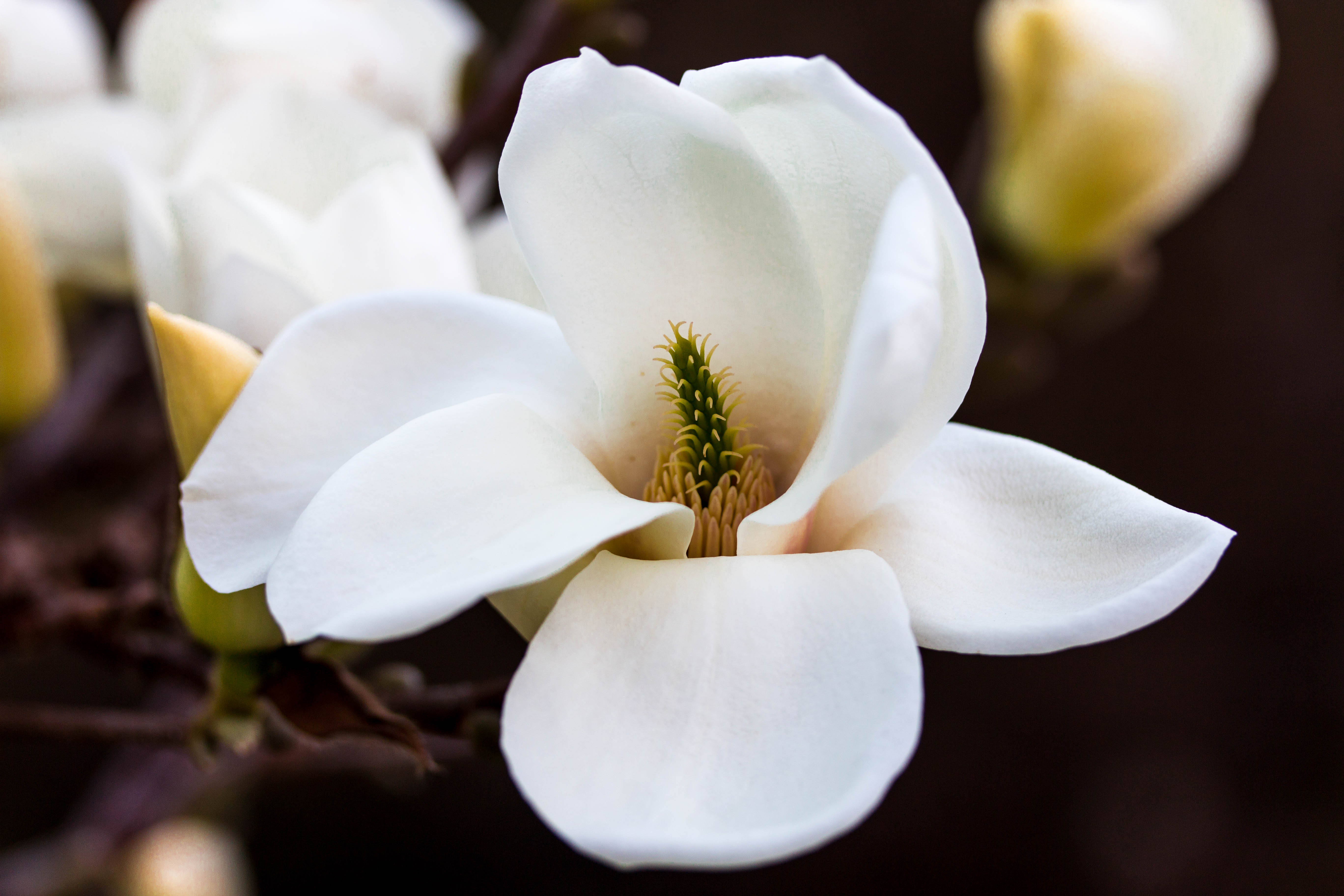 Blüte der Tulpemmagniolie